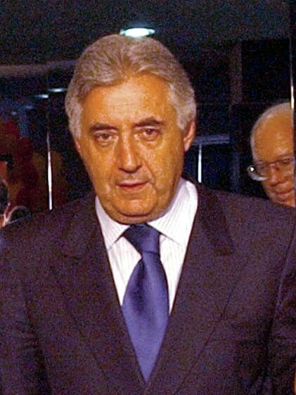 recorte da imagem 71918: Brasília - presidente da Associação Comercial de São Paulo, Guilherme Afif Domingos, no Seminário Sobre Regimes Fiscal e Tributário, no Hotel Nacional. Foto: Antônio Cruz/ABr.